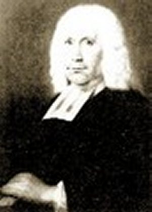 Alexander Comrie (1706-1774)